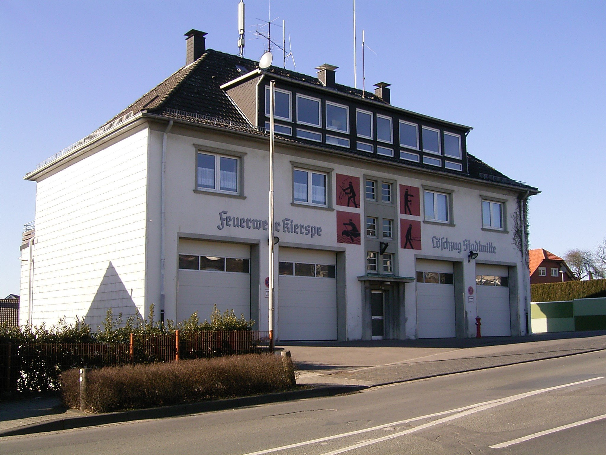 Kierspe